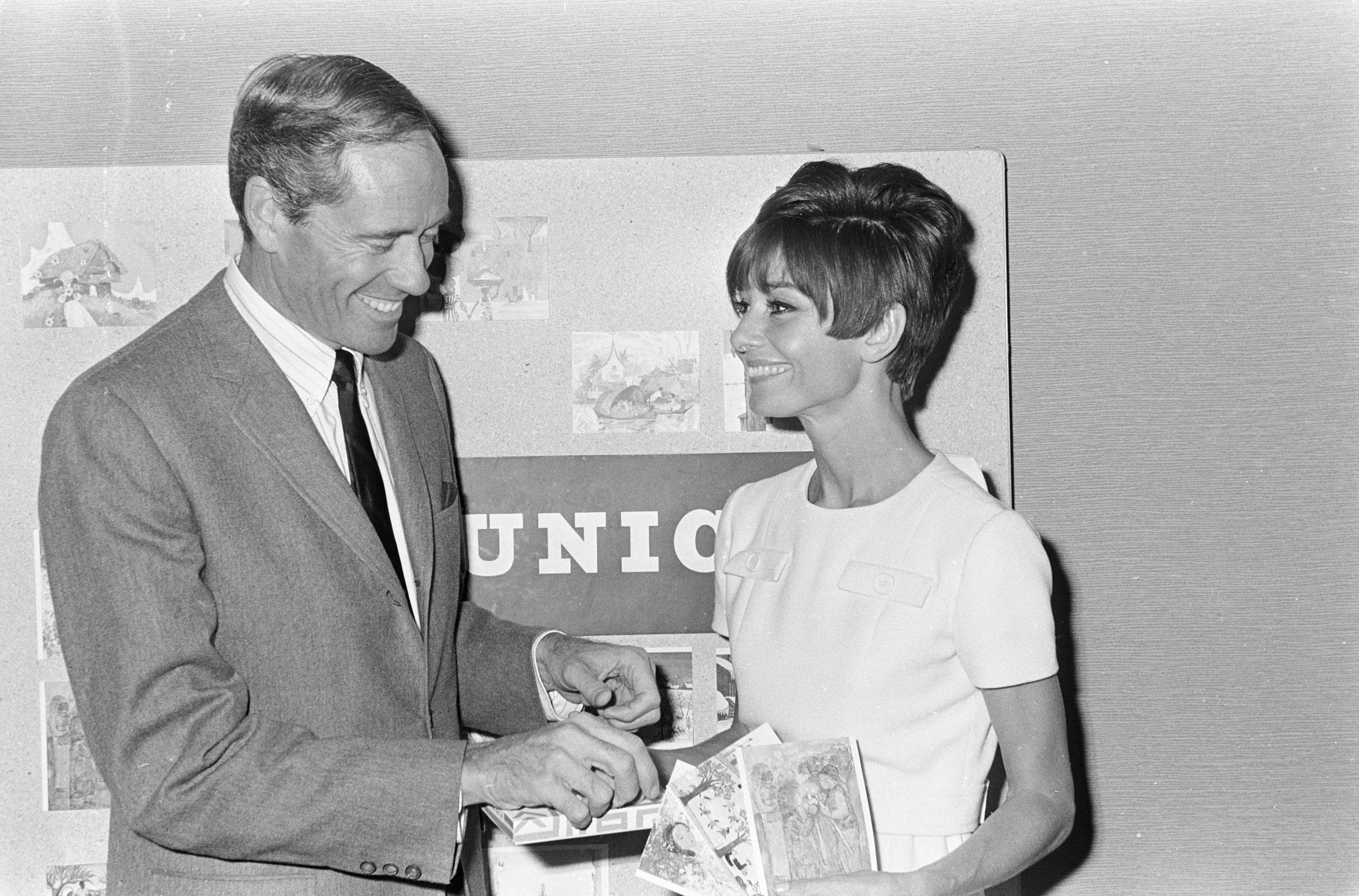 Collectie / Archief : Fotocollectie Anefo Reportage / Serie : Audrey Hepburn en Mel Ferrer in Nederland Beschrijving : In het Rembrandtpleintheater te Amsterdam kopen Audrey en Mel enkele Unicef loten Datum : 16 september 1966 Locatie : Amsterdam, Noord-Holland Trefwoorden : acteurs, actrices, theaters Persoonsnaam : Ferrer, Mel, Hepburn, Audrey Instellingsnaam : UNICEF Fotograaf : Joost Evers / Anefo Auteursrechthebbende : Nationaal Archief Materiaalsoort : Negatief (zwart/wit) Nummer archiefinventaris : bekijk toegang 2.24.01.05 Bestanddeelnummer : 919-5685